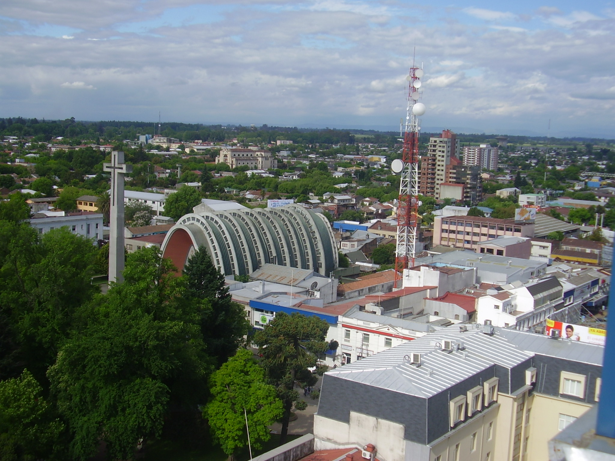 Vista panoramica de la ciudad de Chillan desde uno de los edificios mas altos de chillan, en la foto abajo aparece la plaza de armas, junto a la famosa catedral conocida a nivel nacional como monumento regional, mas la panoramica de fondo del centro, arboles, y otros